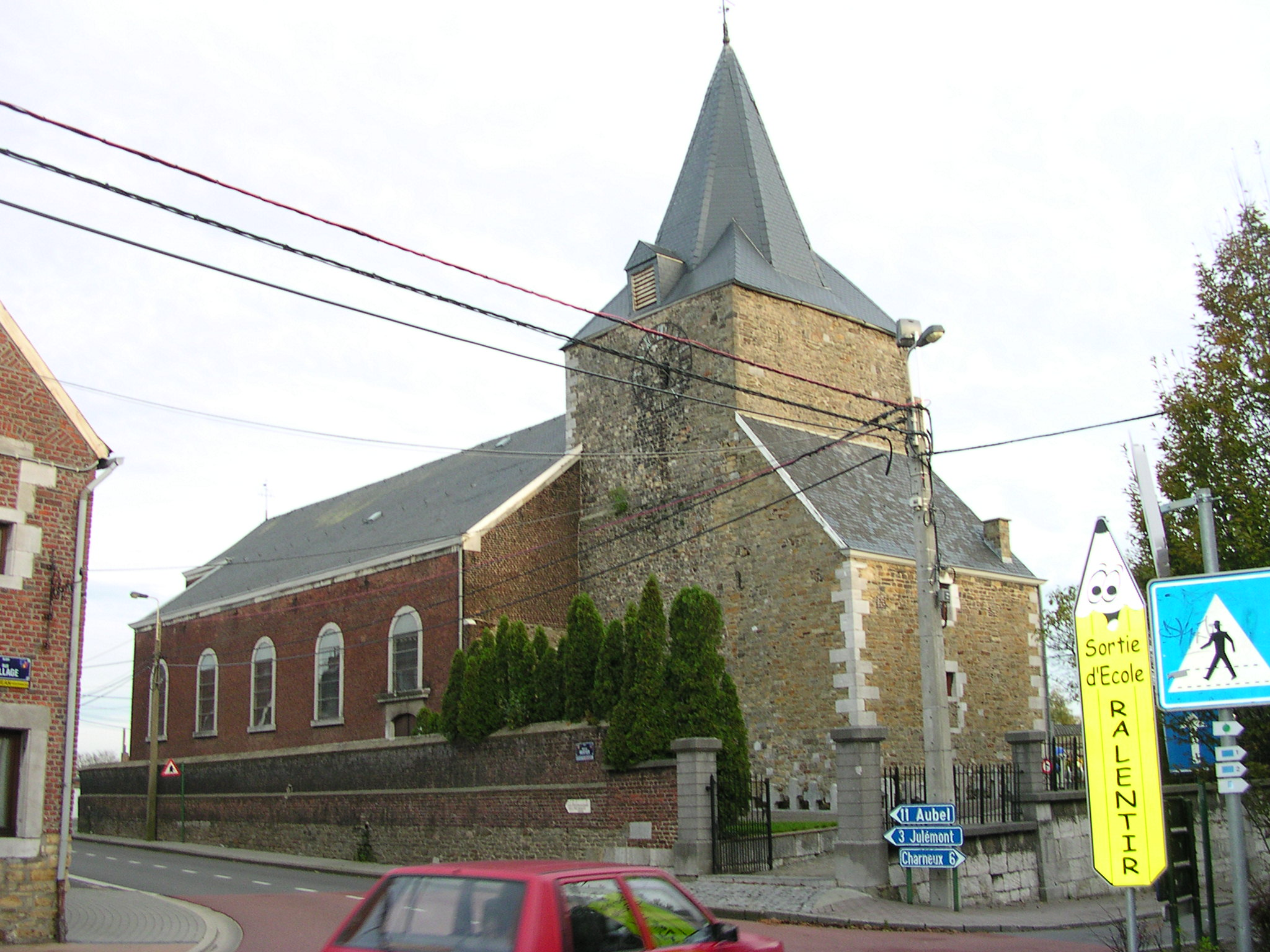 Kirche St. Pierre in Mortier (gehört zu Blegny bei Lüttich)